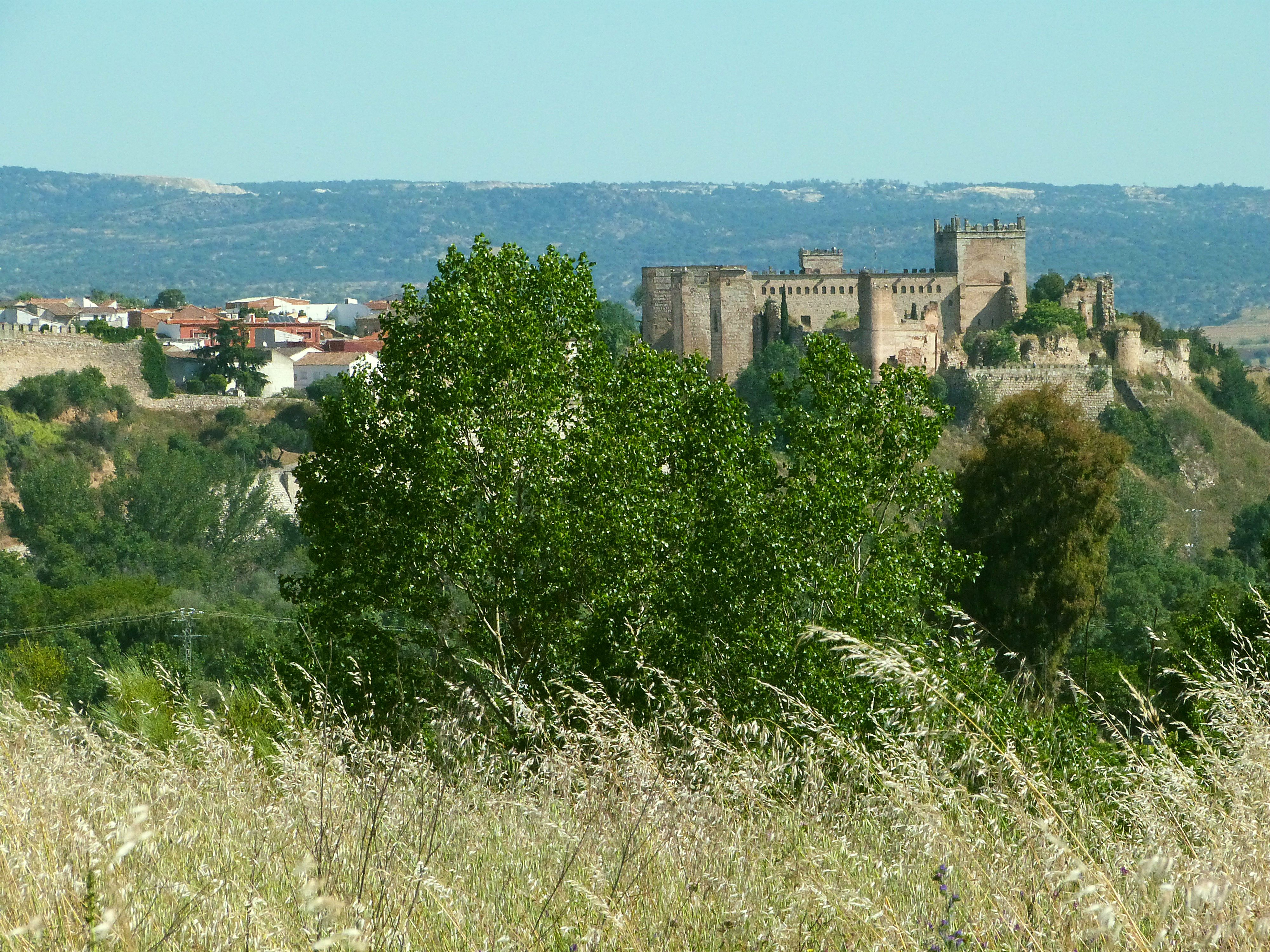 Escalona del Alberche, Castillo